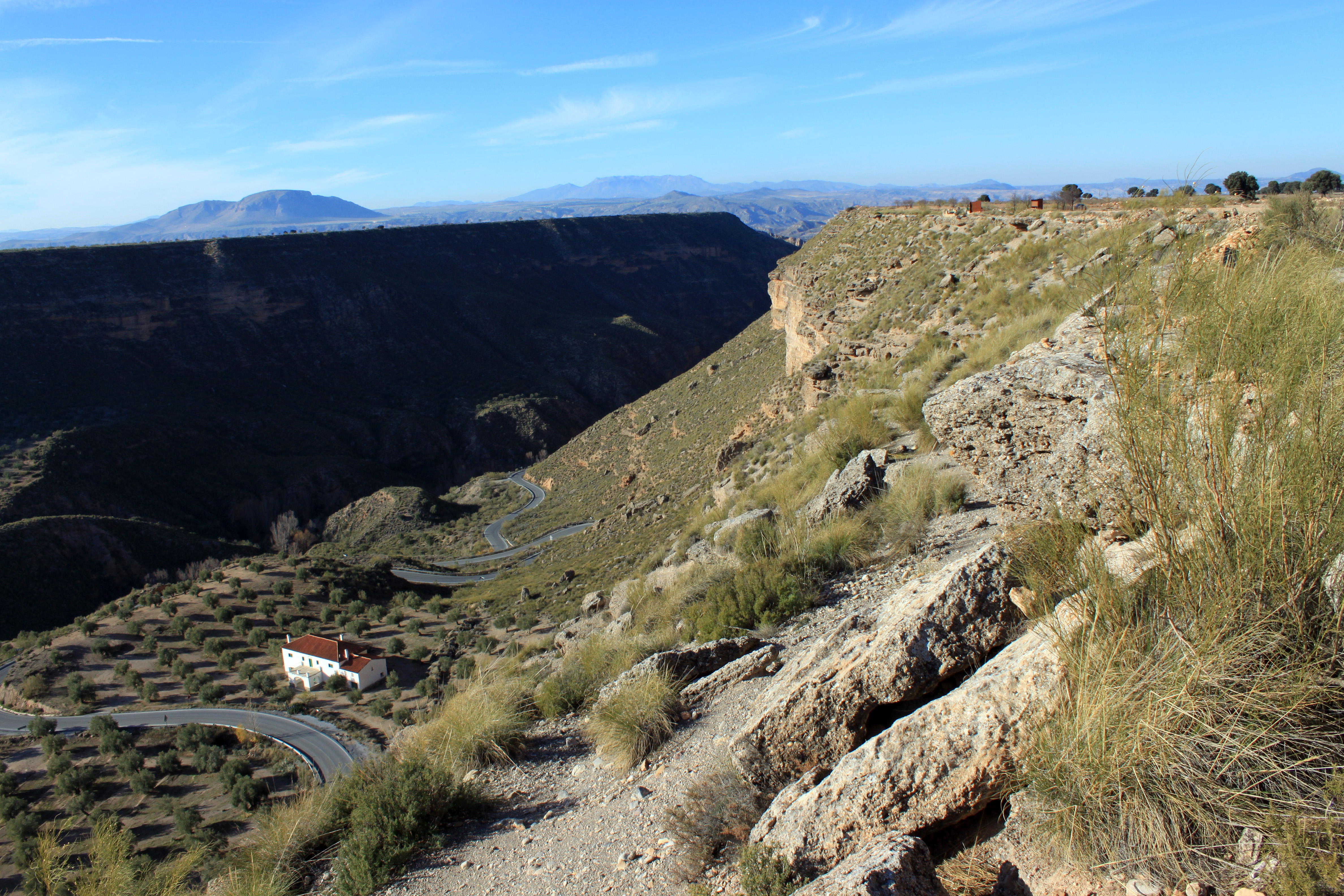 Paraje de la Hoya del Conquil en Gorafe y valle del río Gor, provincia de Granada, Andalucía, España.